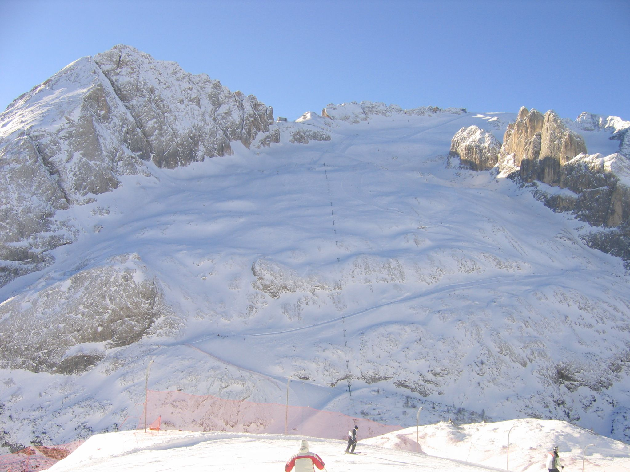 Marmolada - Ski way